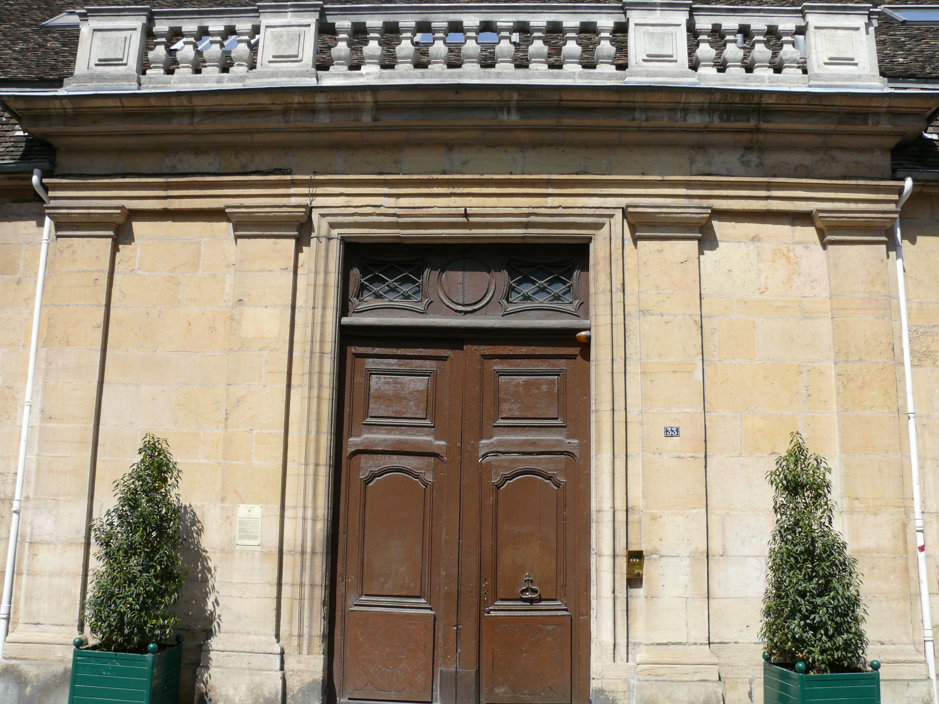 Dijon - Hôtel Arviset Jehannin de Chamblanc - Portail